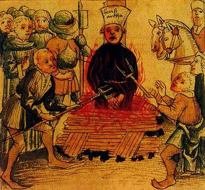 Наказание за идею. Изображает еретика, сжигаемого на костре Инквизицией.